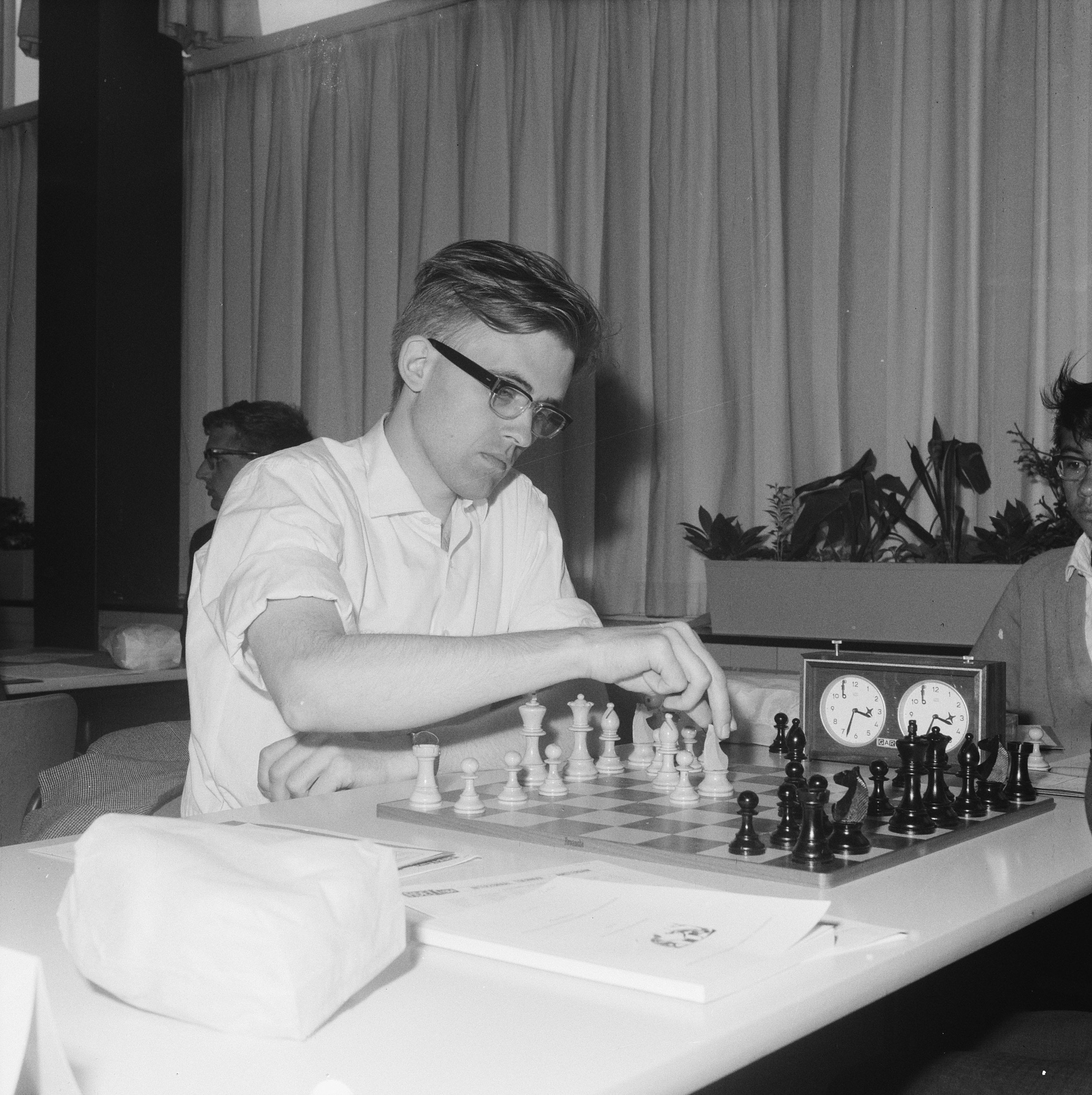 Collectie / Archief : Fotocollectie Anefo Reportage / Serie : [ onbekend ] Beschrijving : Inter zoneschaaktoernooi te Amsterdam, de Deen Larsen Datum : 7 juni 1964 Locatie : Amsterdam, Noord-Holland Trefwoorden : schaaktoernooien Fotograaf : Broers, F.N. / Anefo Auteursrechthebbende : Nationaal Archief Materiaalsoort : Negatief (zwart/wit) Nummer archiefinventaris : bekijk toegang 2.24.01.03 Bestanddeelnummer : 916-5165